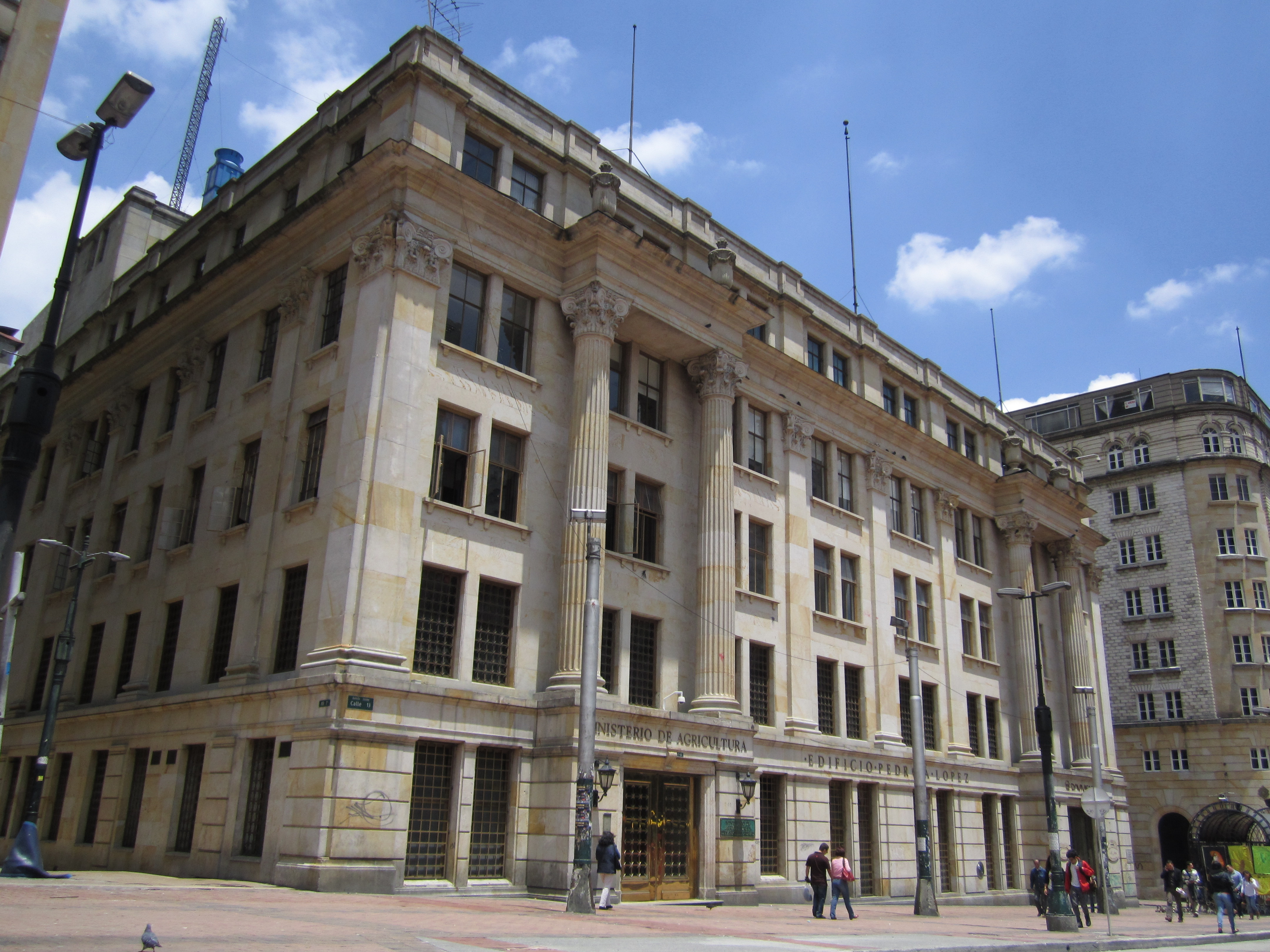 Bogotá edificio Pedro A. López en la avenida Jiménez con carrera Octava.